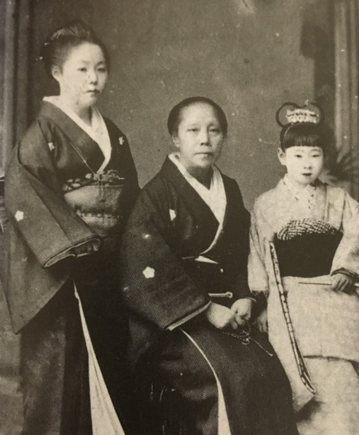 原田まさの肖像写真。